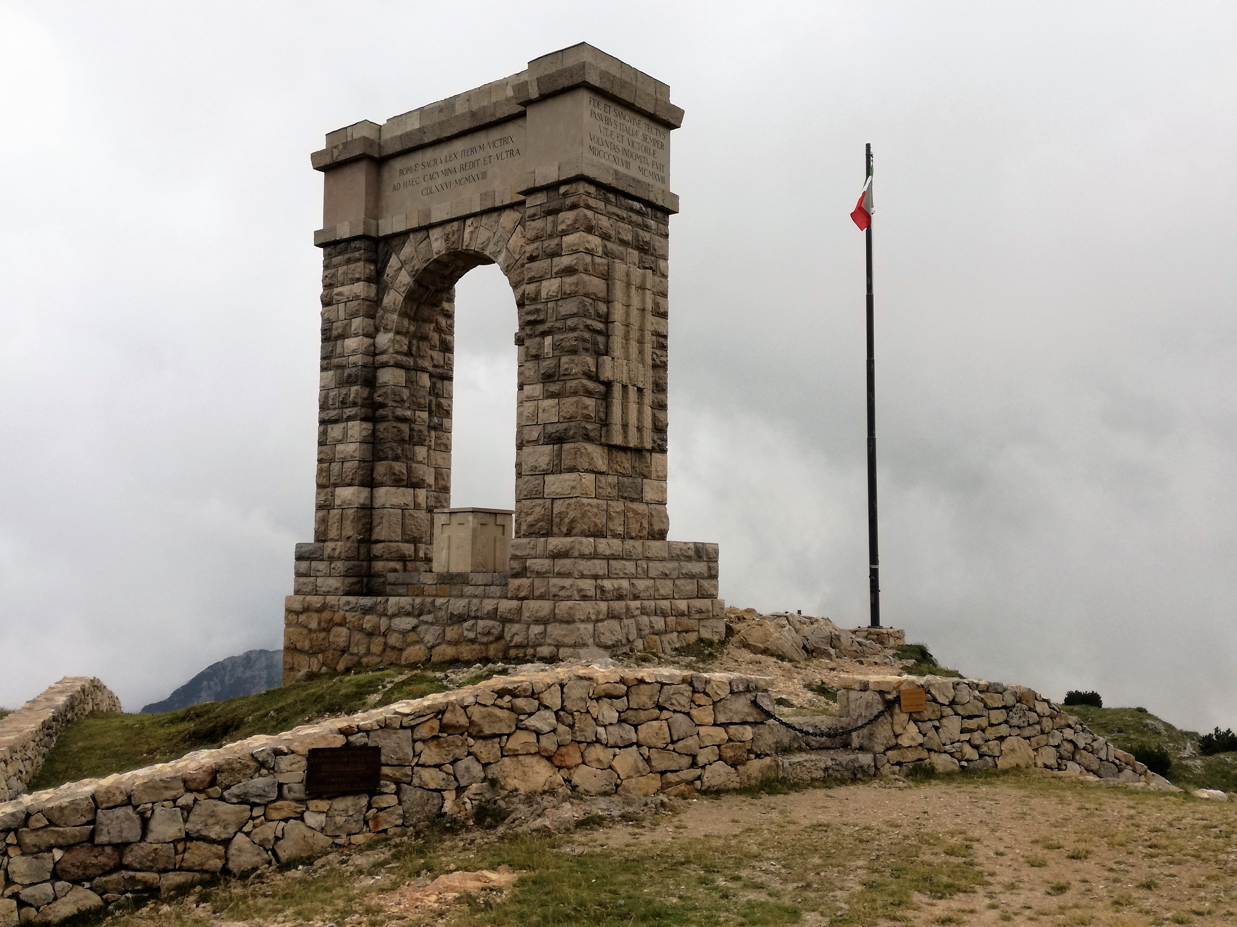 Römischer Triumphbogen - Soldatenfriedhof Brigata Liguria Pasubio